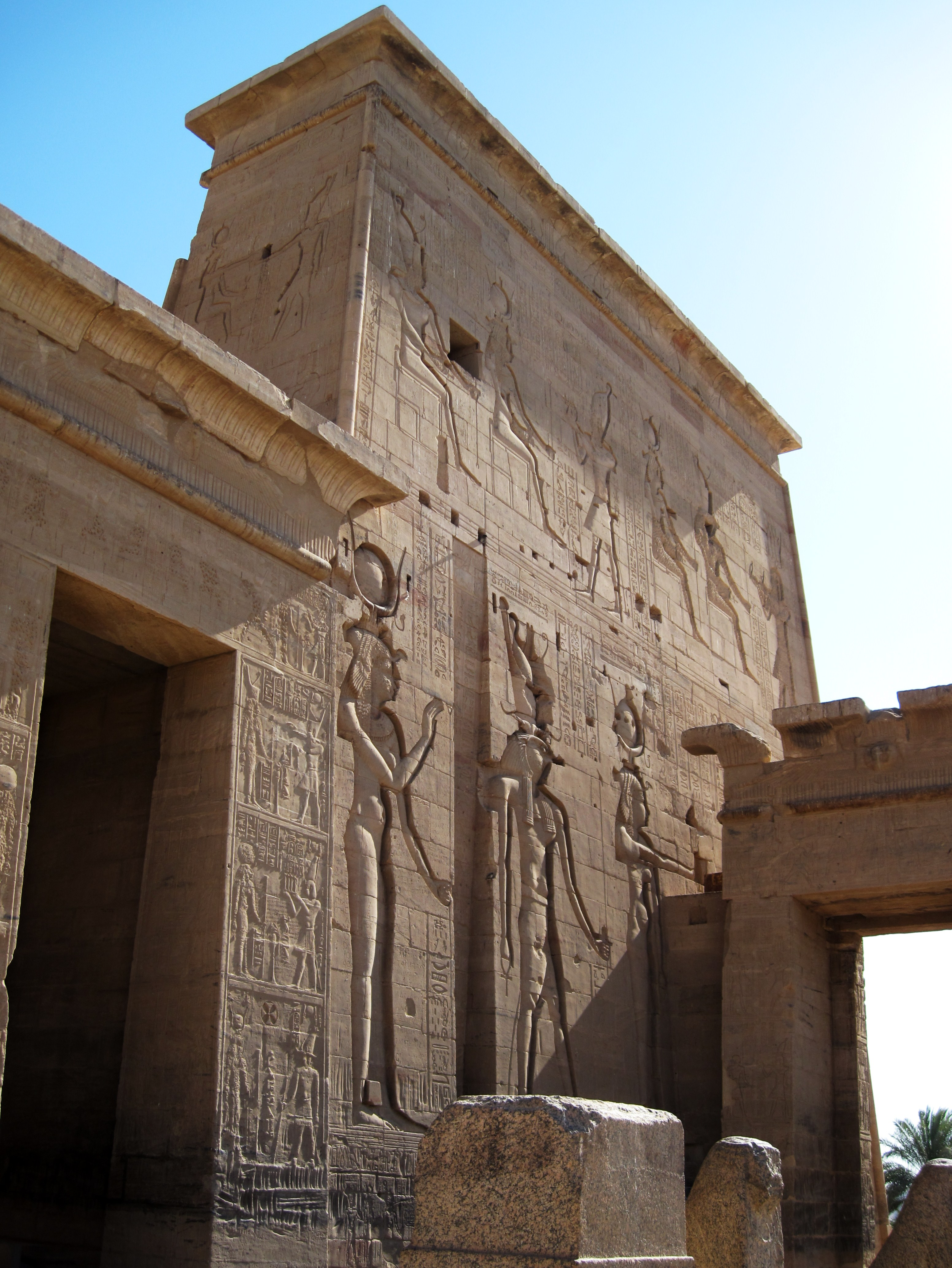 Eingang zum Isis-Tempel von Philae (erster Pylon) auf der Insel Agilkia, Ägypten